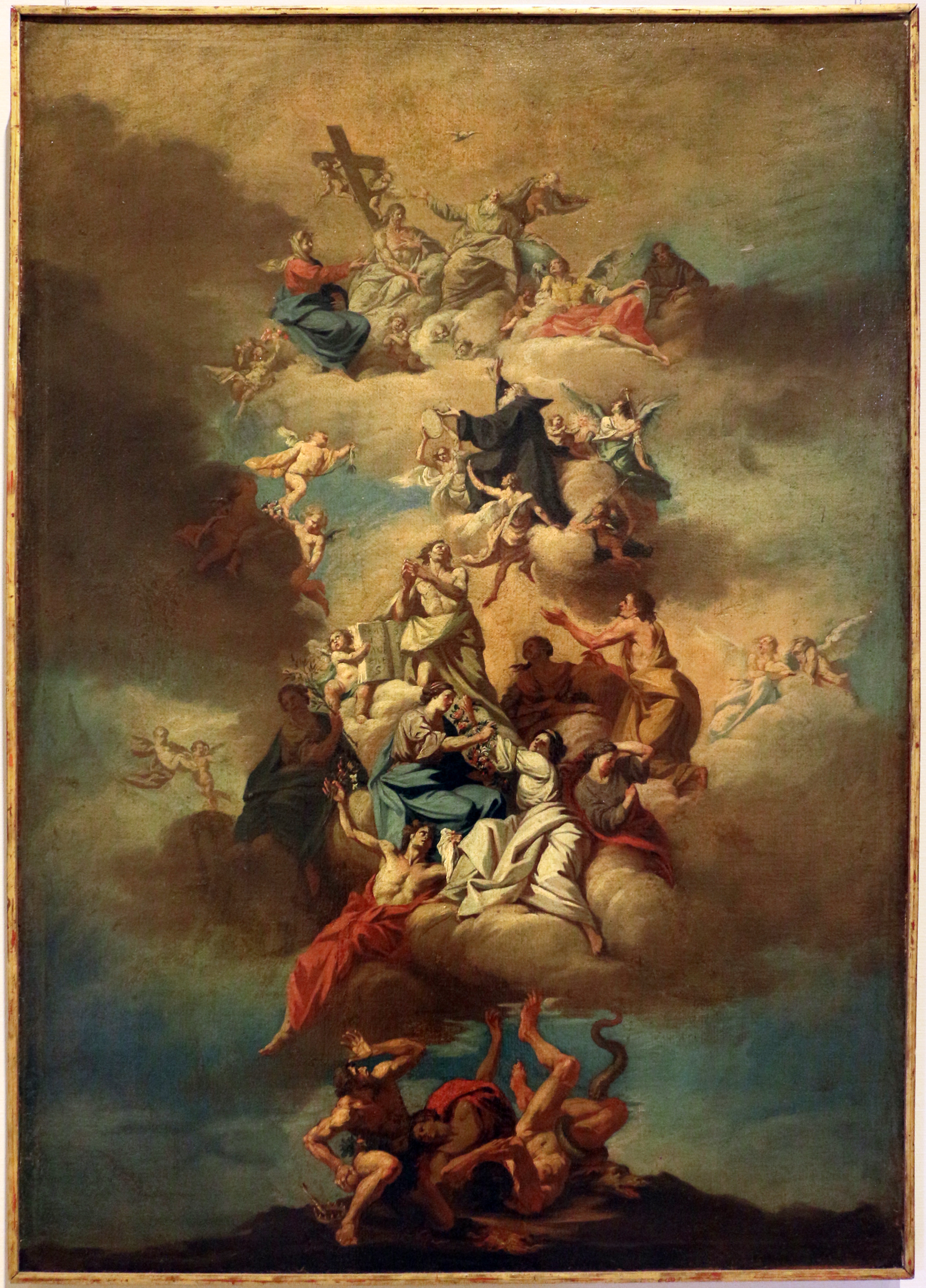 gloria di san francesco di padovatitle QS:P1476,it:"gloria di san francesco di padova" label QS:Lit,"gloria di san francesco di padova"